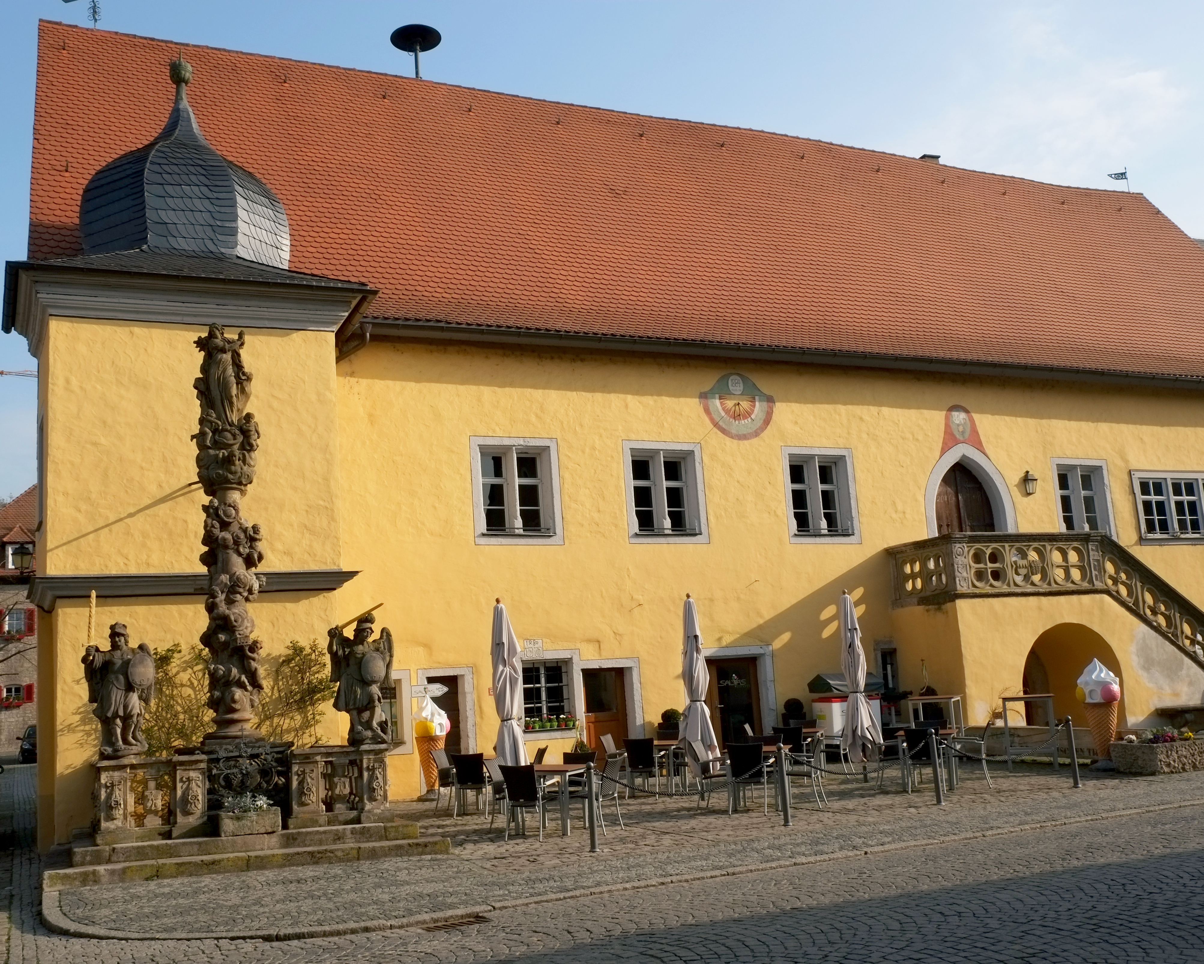 Rathaus in Frickenhausen am Main im Landkreis Würzburg (Bayern, Deutschland)